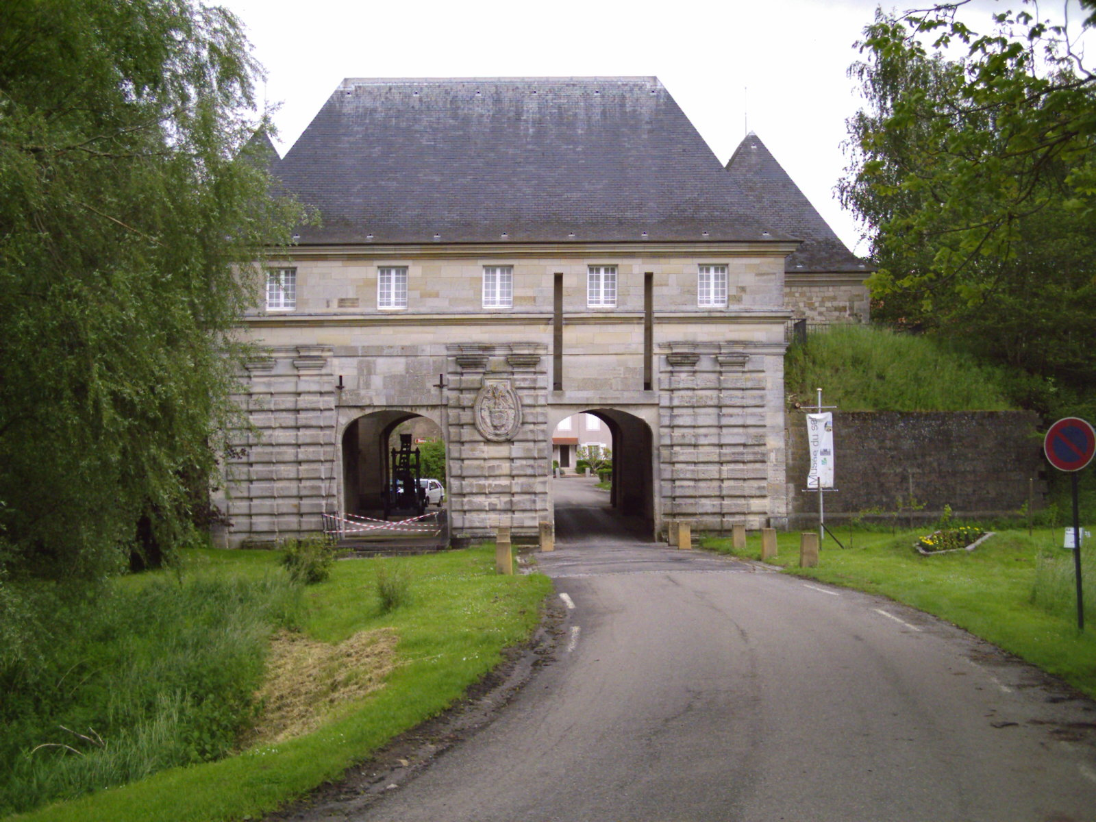 Marsal 57 France, Porte de France, vue exterieure